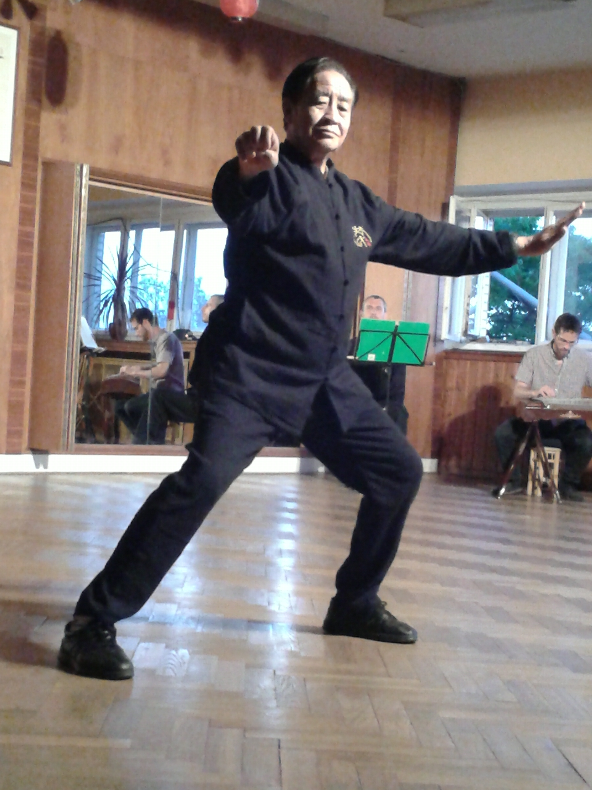 Mistr Zhu Tiancai při ukázce cvičení na slavnostním večeru v Taiji Akademii v Praze na Vinohradech v pátek dne 25. května 2018. Zhu Tiancai (Ču Tchien-cchaj) (* 25. července 1944, Xian (Si-an) (Sien), provincie Shanxi (Šen-si) (Šan-si), Čína) vyrůstal od šesti let ve vesnici Chenjiagou (Čchen-ťia-kou), kolébce Tchaj-ťi čchüan. V roce 1958 se jeho učitelem Tchaj-ťi stal Mistr Chen Zhao Pi (Čchen Čao Pchi), pod jehož vedením získal Zhu Tiancai znalost sestav tzv. Staré školy (Lao-ťia): sestav beze zbraně i sestav s jedním a dvěma meči, kopím a tyčí. Dalším jeho učitelem byl Chen Zhao Kui (Čchen Čao Kchuej), který jej naučil Tchaj-ťi čchüan sestavy tzv. Nové školy (Sin-ťia). Od začátku 80. let dvacátého století se Zhu Tiancai profesionálně věnuje výuce Tchaj-ťi čchüan. Od začátku 90. let dvacátého století propaguje toto bojové umění a životní filozofii svými cestami nejen po Číně, ale po celém světě. Mistr Zhu Tiancai je řazen mezi pokračovatele 19. generace rodiny Čchen (je mistrem 19. generace Čchen Tchaj-ťi čchüan), je jedním z tzv. „Čtyř Buddhových bojovníků“, je počítán mezi tzv. „Čtyři tygry z Čchen-ťia-kou“ a v neposlední řadě je zahrnován mezi 13 velmistrů Tchaj-ťi čchüan na světě.